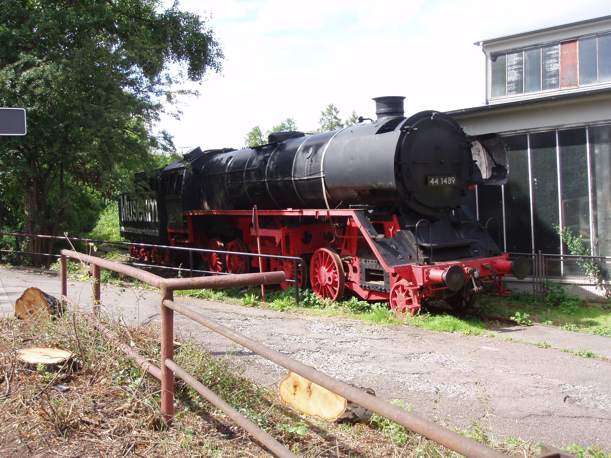 Eisenbahnmuseum Heilbronn, Lok 44 1489, G 56.20, Baujahr 1943, Hersteller: Creusot, Fab.-Nr. 4731